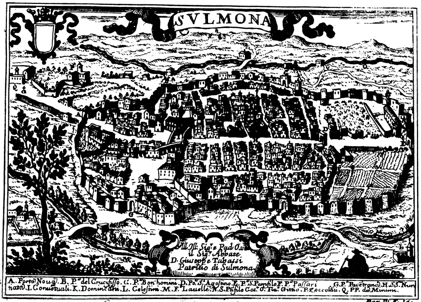 Disegno settecentesco di Sulmona